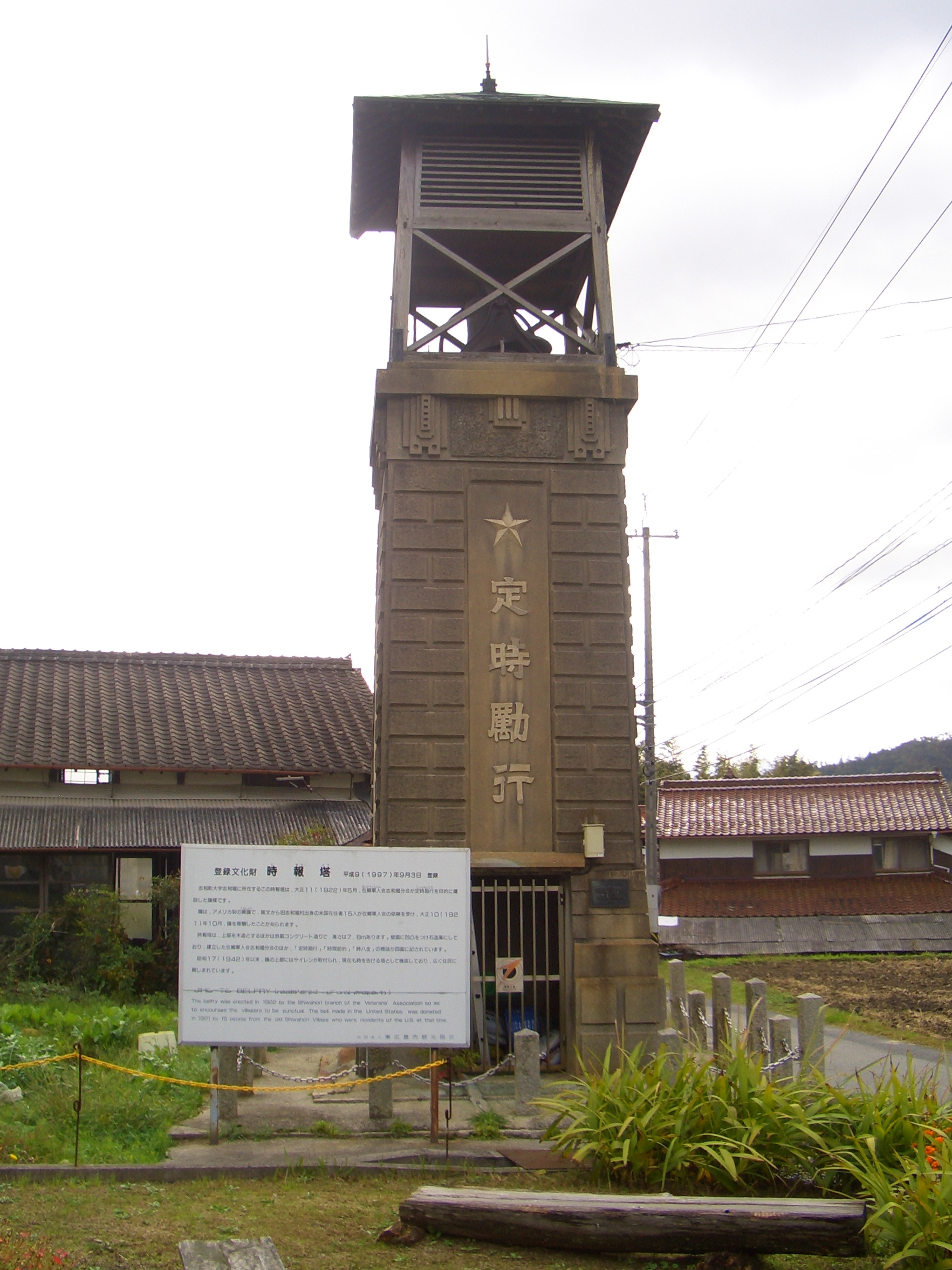 時報塔の写真